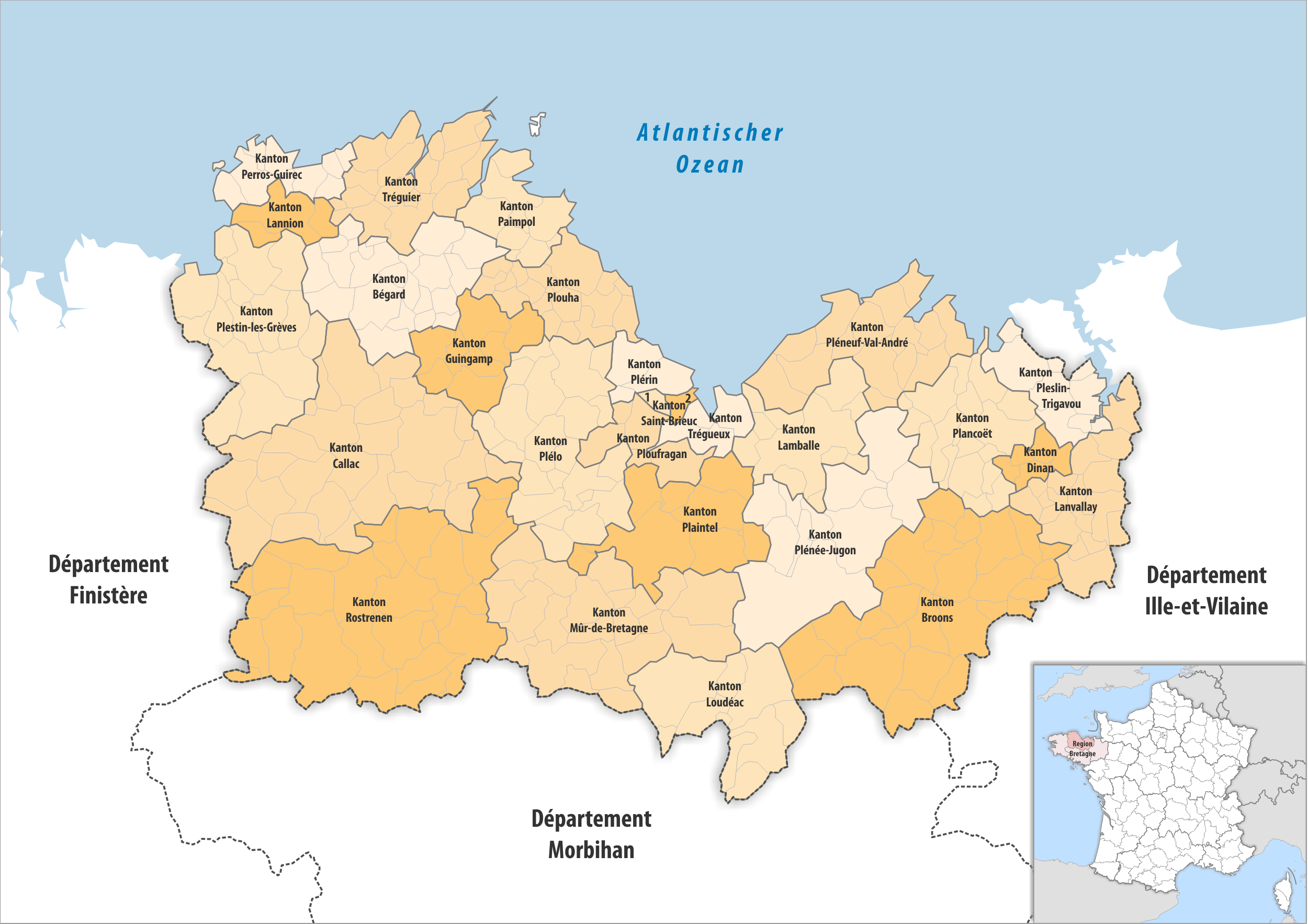 Gemeinden und Kantone im Departement Côtes-d’Armor